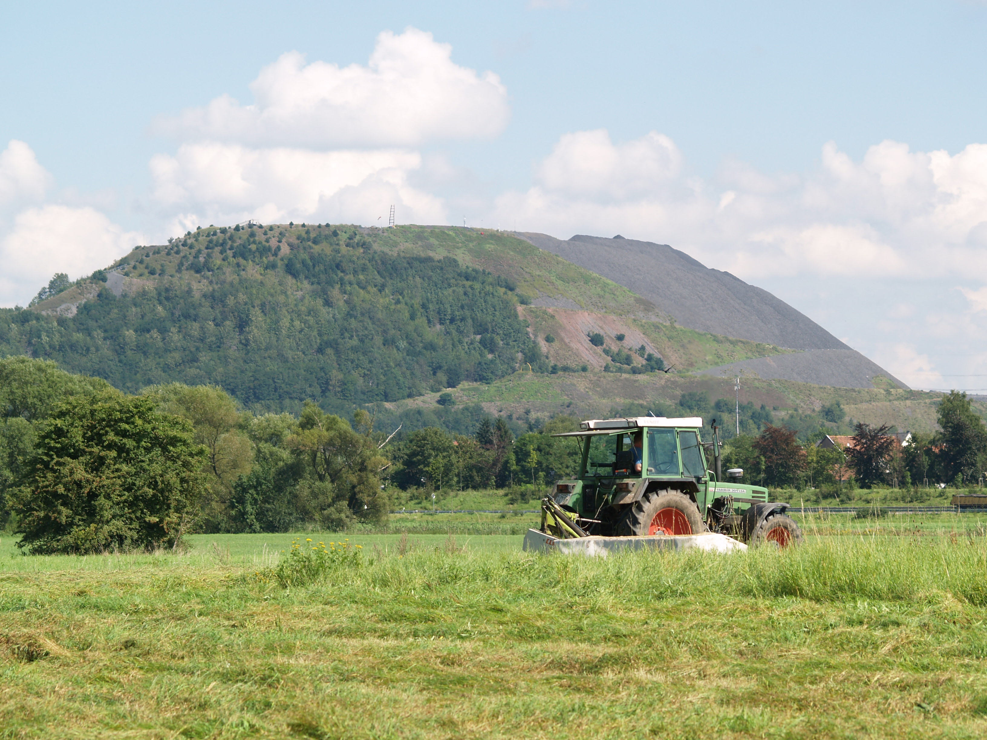 Bergehalde Ensdorf. Blickrichtung: Von Wiese an der Saar - nähe Kraftwerk. Fendt Farmer 309 LSA mit Claas-Mähwerk.